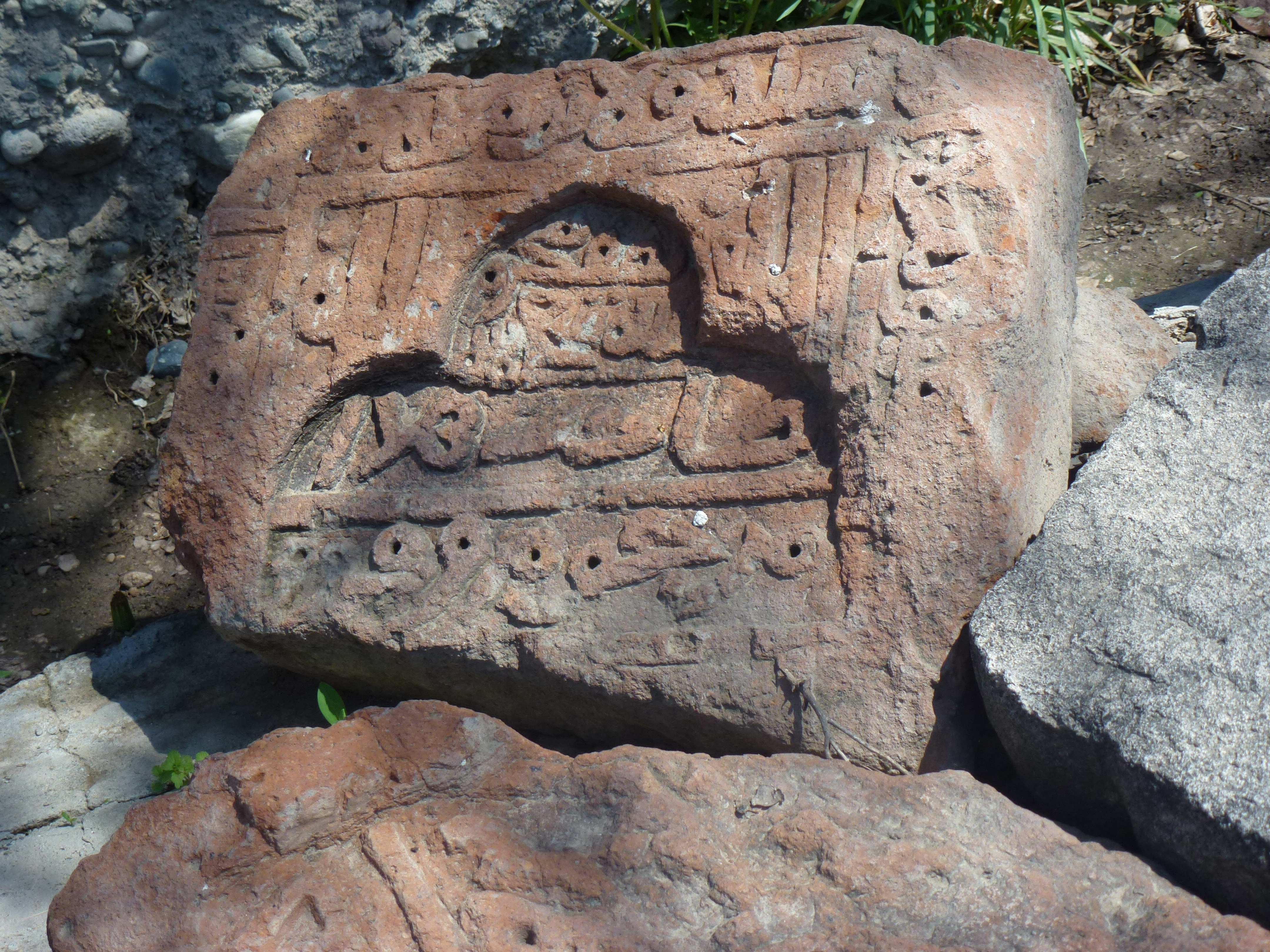 Դվինի ավերակներ, Հայաստան 53/1